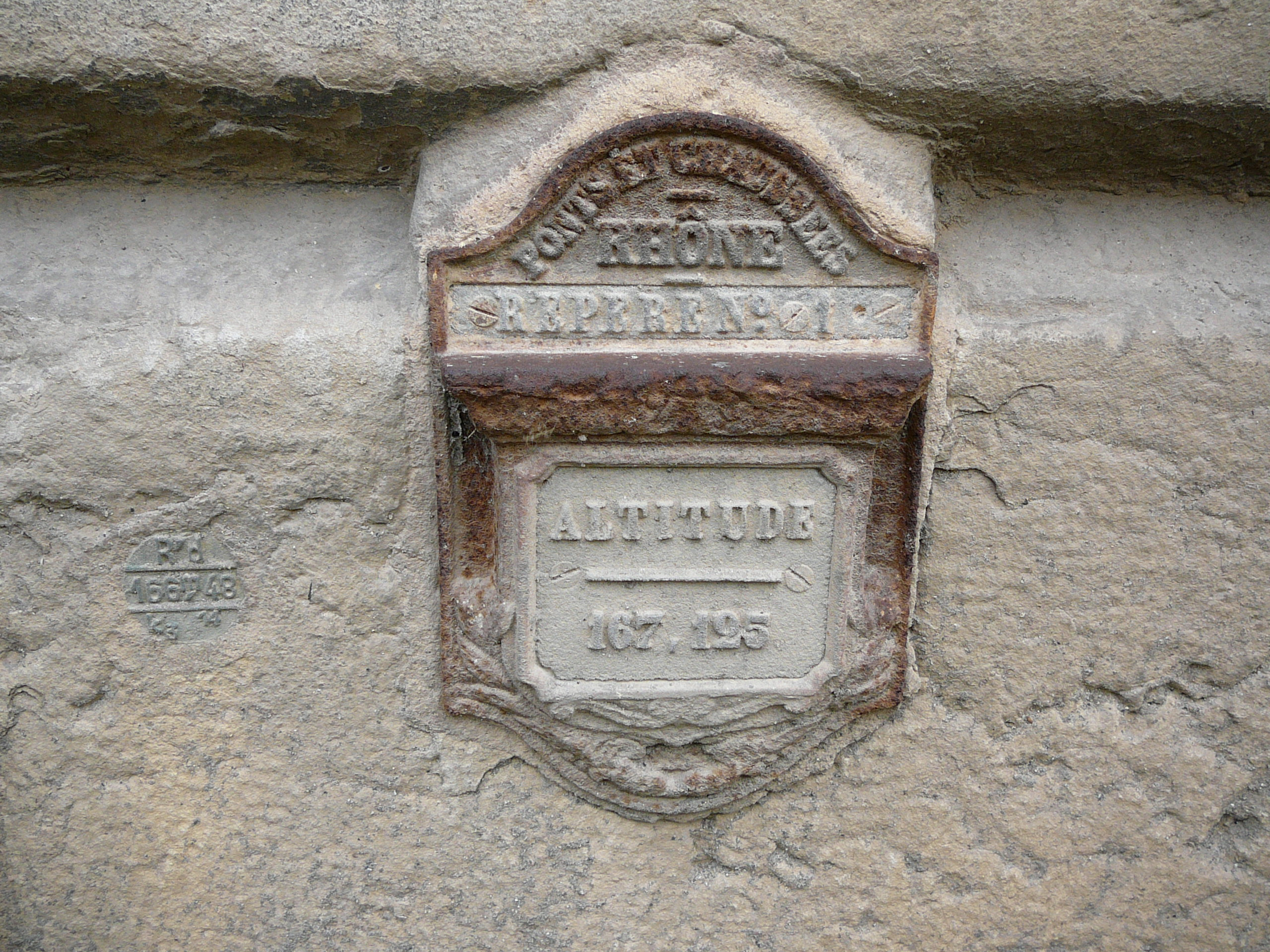 Plaques en métal à proximité de l'entrée du fort de la Vitriolerie à Lyon. Sur la première il est inscrit: «166,48». Sur la seconde il est inscrit : «Pont et chaussées du Rhône, repère n°1, altitude: 167,125».